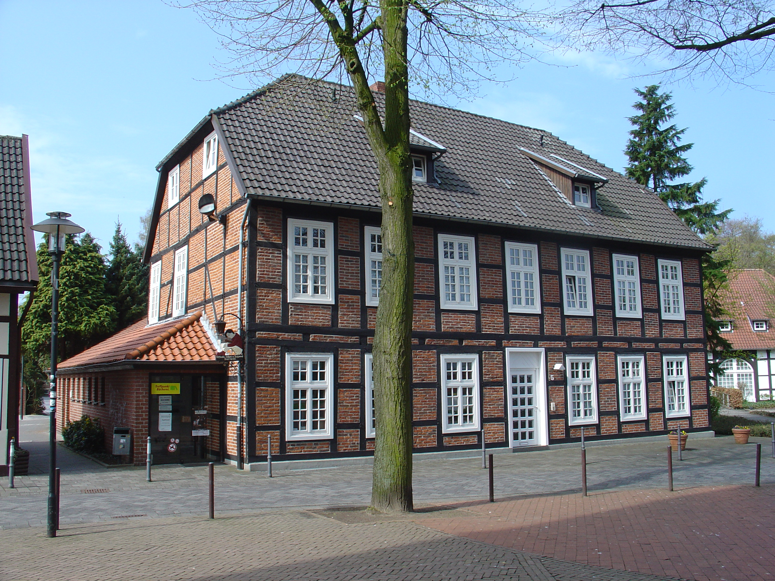 Ehemalige Mädchenschule, heute Schwesternheim und Bücherei Harsewinkel